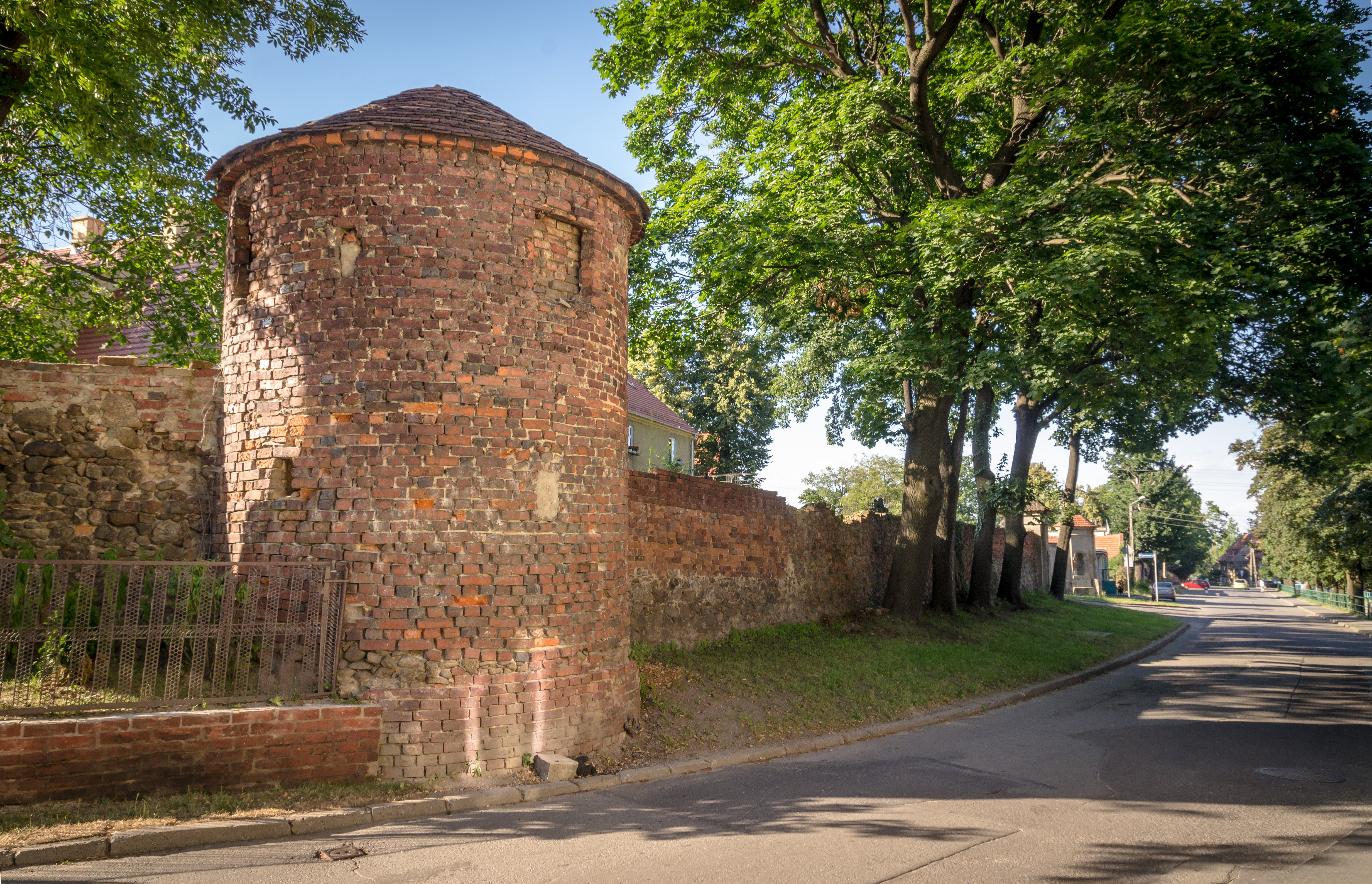 Pieszyce, mury obronne This photo of Lower Silesian Voivodeship was taken during Wikiexpedition 2013 set up by Wikimedia Polska Association.You can see all photographs in category Wikiekspedycja 2013.